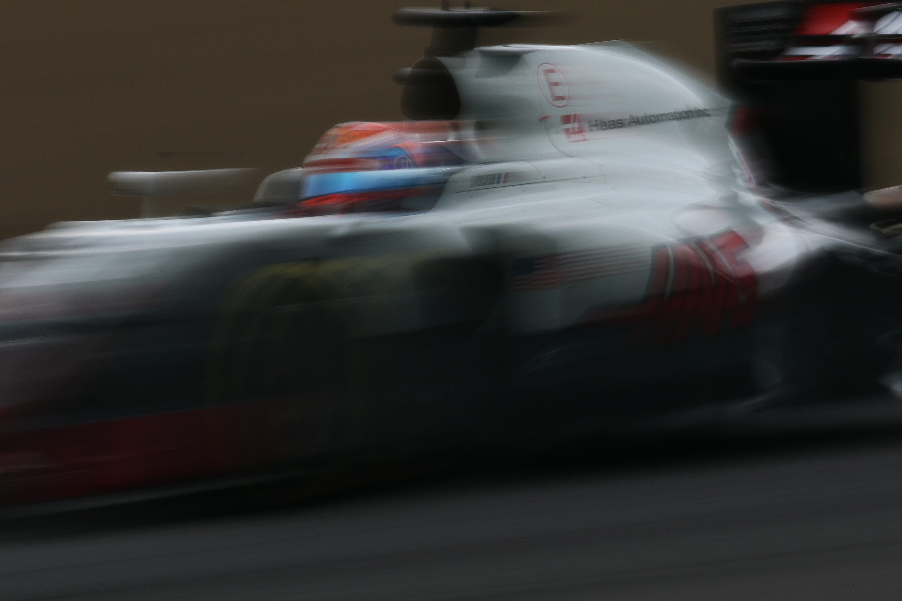 2016.10.7 F1 Rd.17 Japanese GP SUZUKA (FP2) HAAS F1 Team (VF-16) 8 ロメイン・グロージャン [7D2_7086ks]